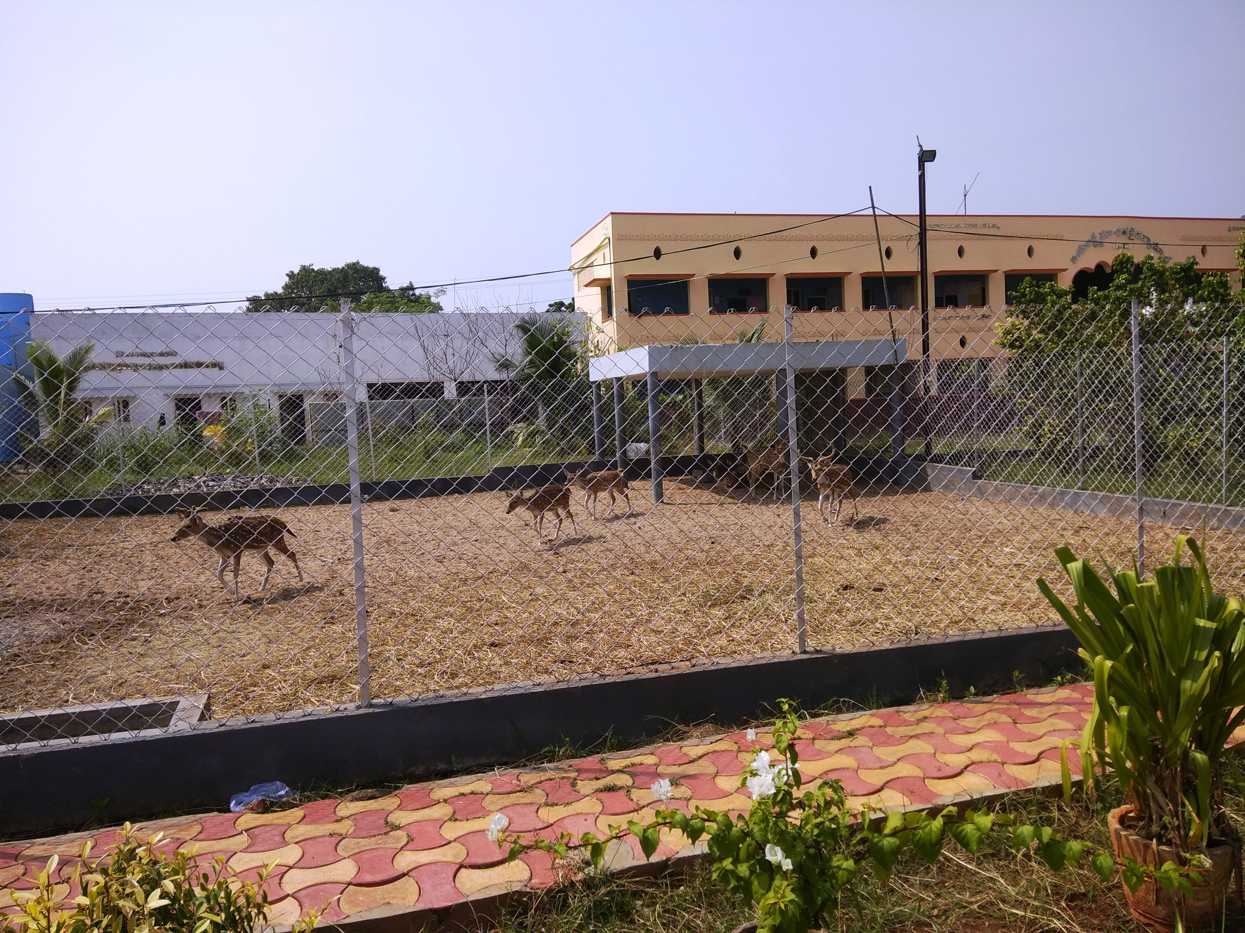 జింకల పార్క్